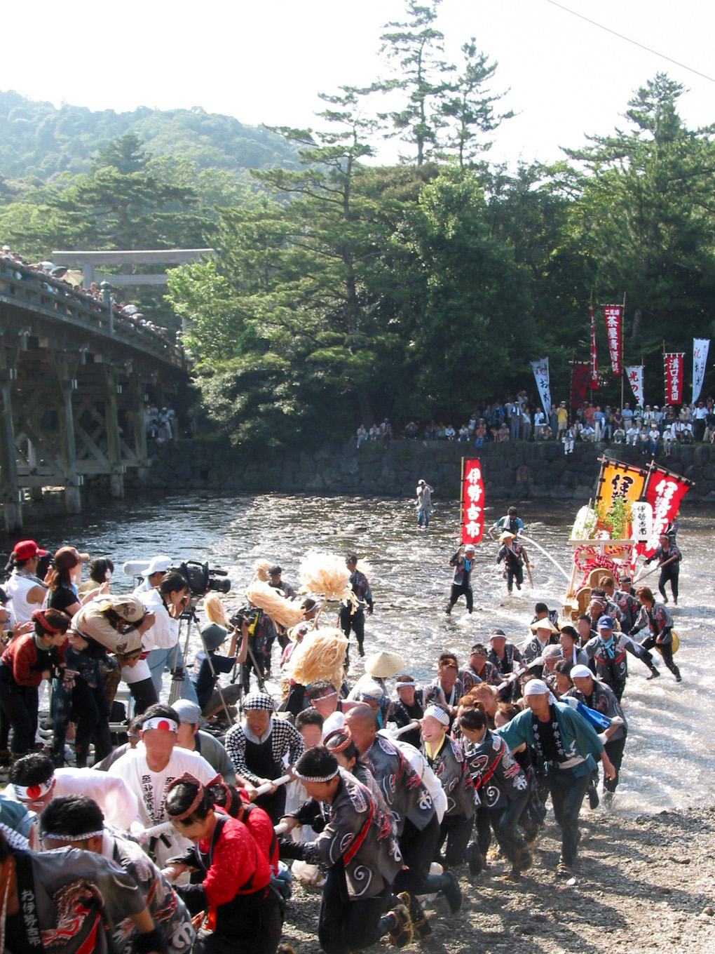 "En-yabiki" of Okihikigyoji(Kawabiki) at Naiku 御木曳行事（内宮領・川曳）における「エンヤ曳き」三重県伊勢市宇治館町の皇大神宮（伊勢神宮・内宮）宇治橋付近にて撮影